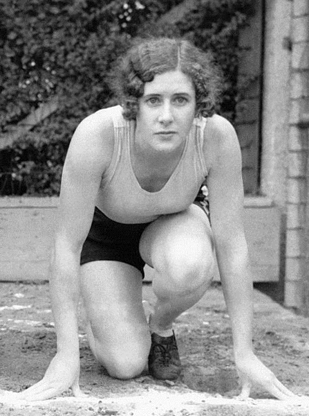 Alice Wearne, athlète de Nouvelle Zélande s'entraînent pour les Jeux Olympiques à Los Angeles, Californie, Etats-Unis le 3 juillet 1932.